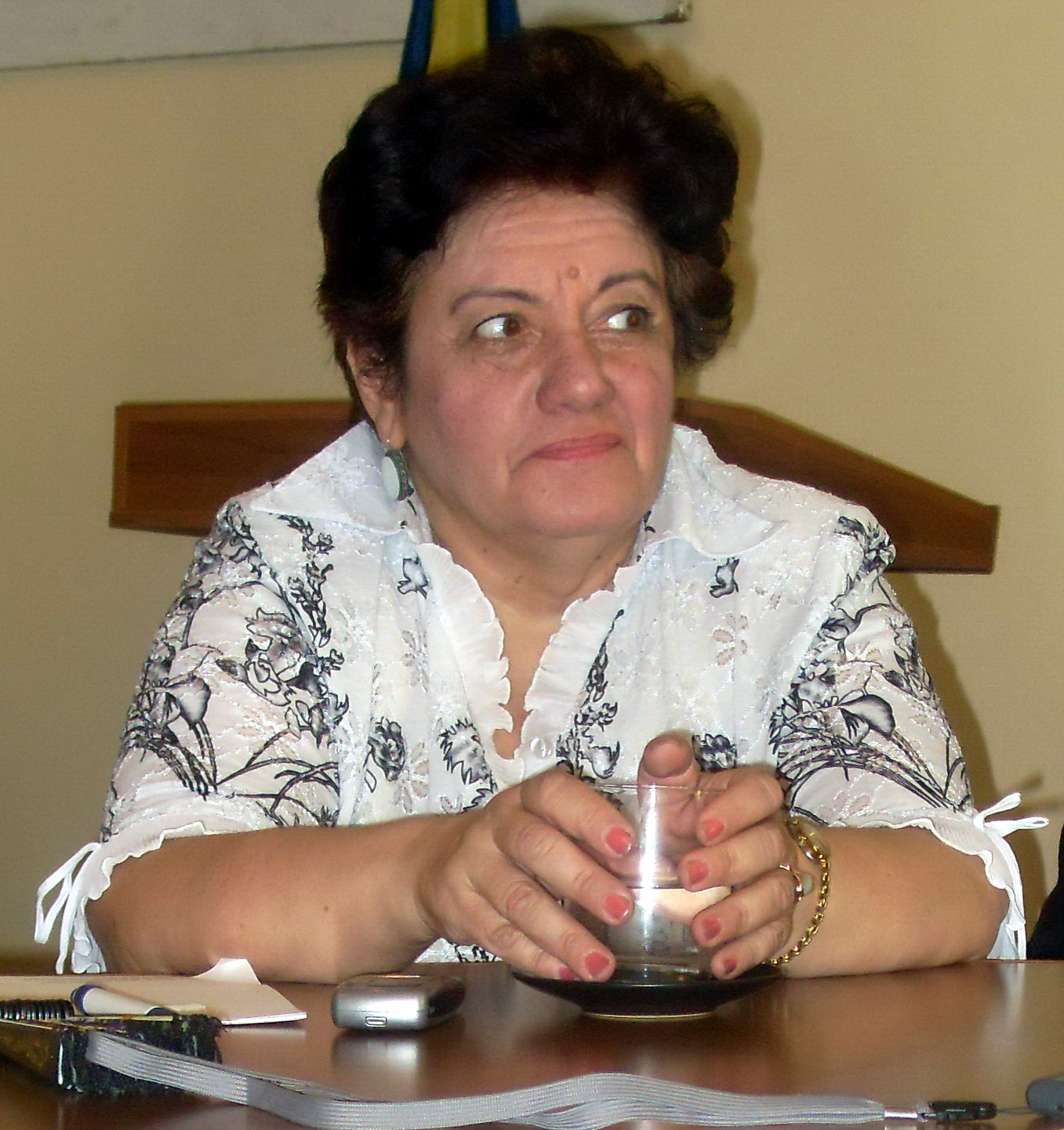 Կարինե Դանիելյան, հայ բնապահպան, ՀՀ պետական և հասակակական գործիչ, «Հանուն կայուն մարդկային զարգացման» ասոցիացիայի նախագահ։